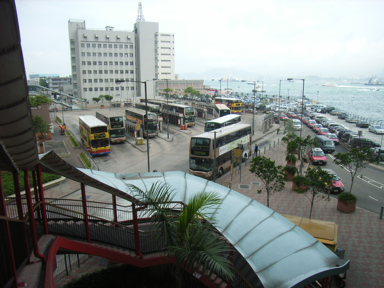 香港上環港澳客運碼頭附近在歷史上有著名的新填地(大笪地)，是平民夜總會，即舊zh:港澳碼頭，現在是成為上環巴士總站，及停車場